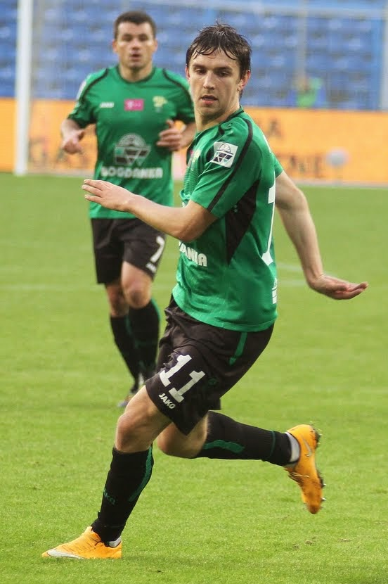 Fiodor Cernych w barwach Górnika Łęczna